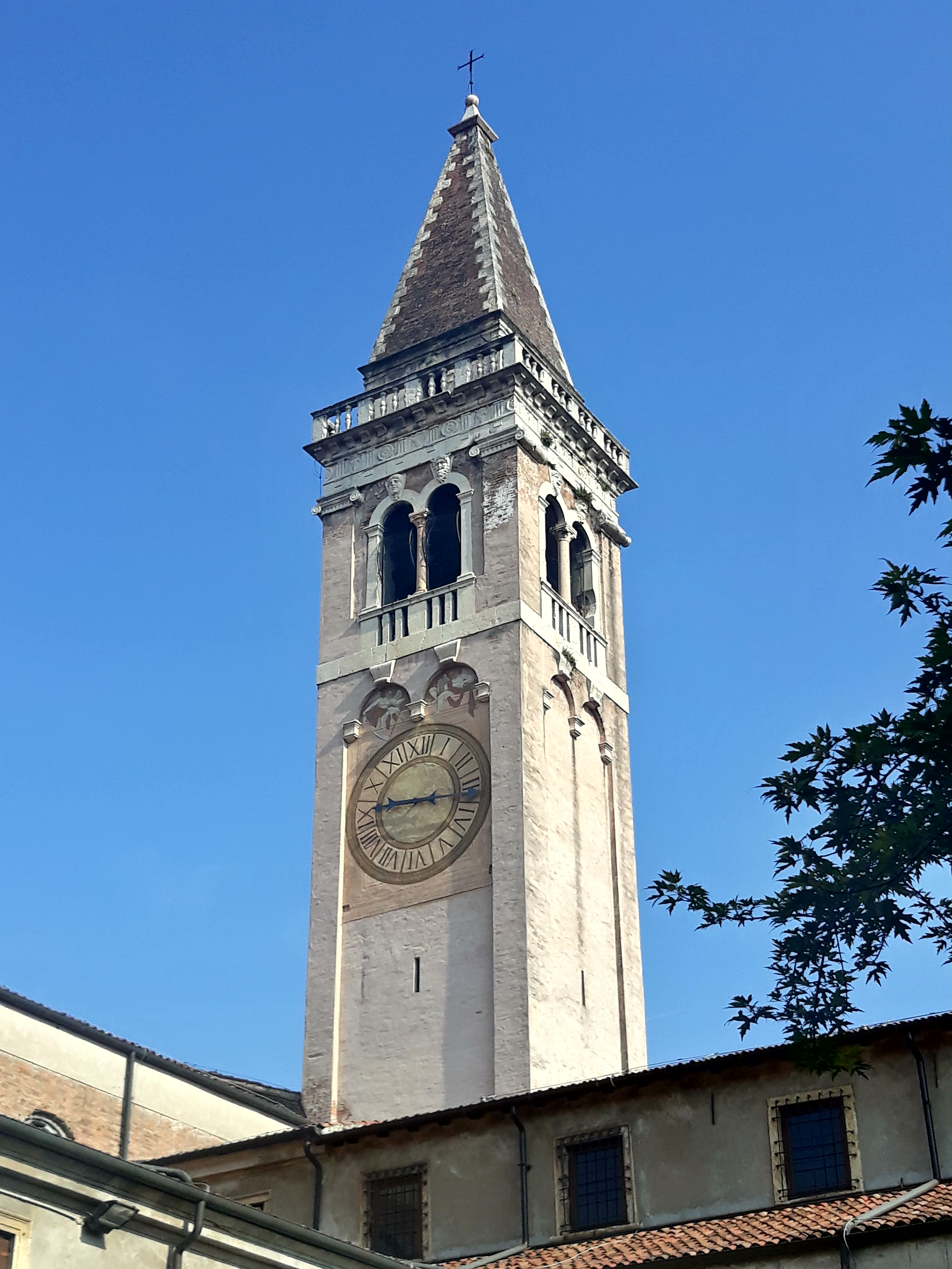 Campanile della chiesa dei santi San Nazaro e Celso a Verona